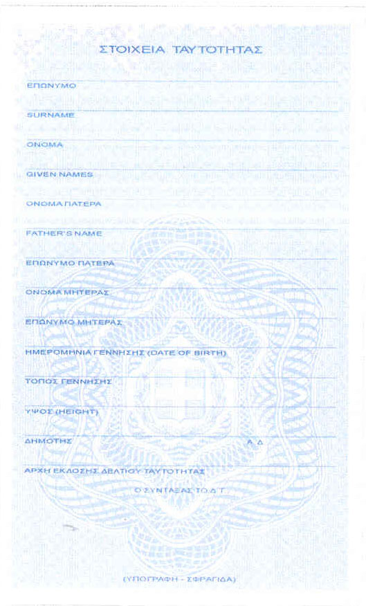 Η πίσω όψη του Ελληνικού Δελτίου Ταυτότητας.